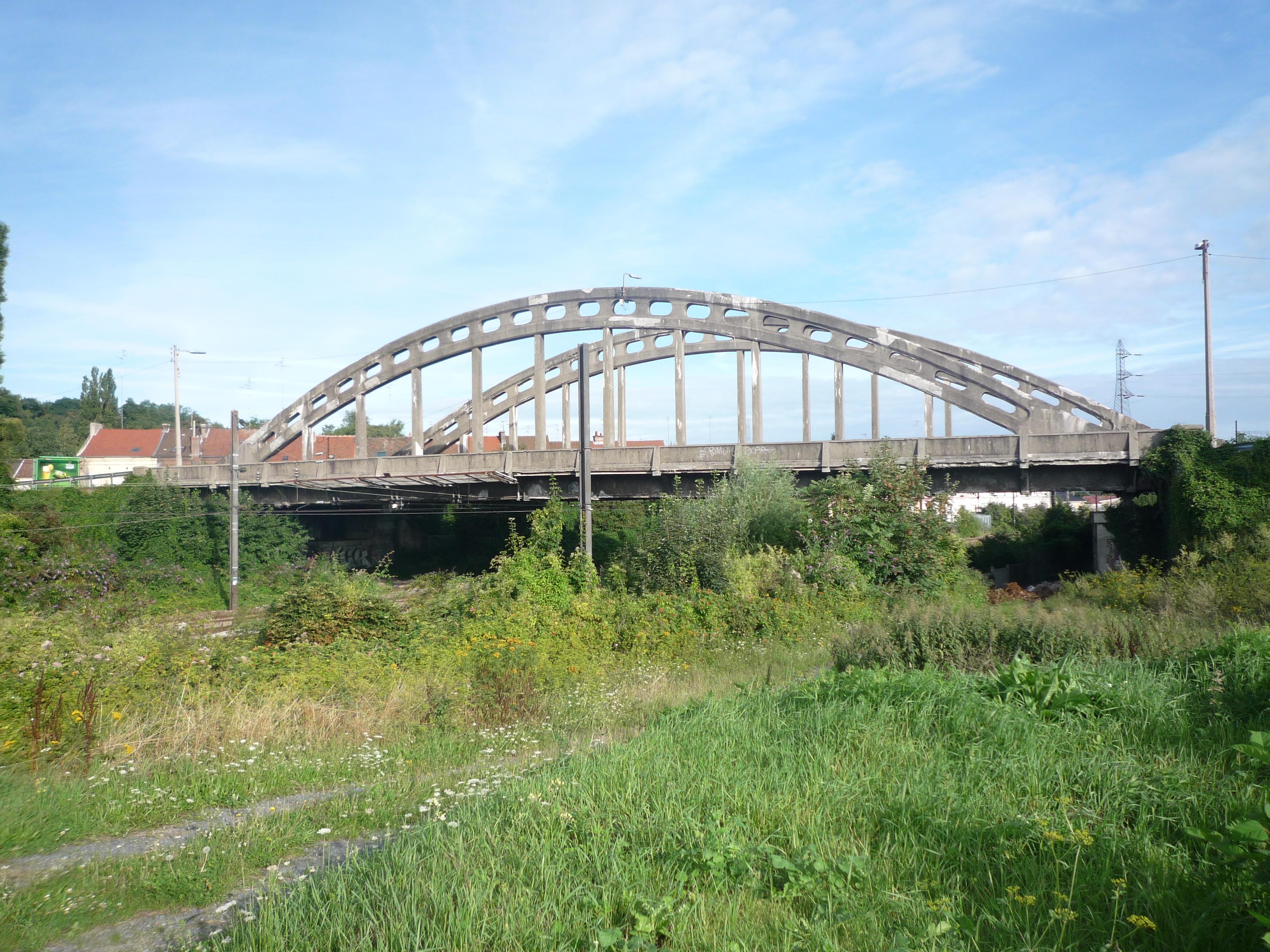 Le pont de la Bleuse-Borne à Anzin. Pont au dessus de la ligne ferroviaire, Anzin, Nord, Nord-Pas-de-Calais, France.